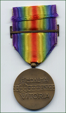 Medaglia interalleata della vittoria